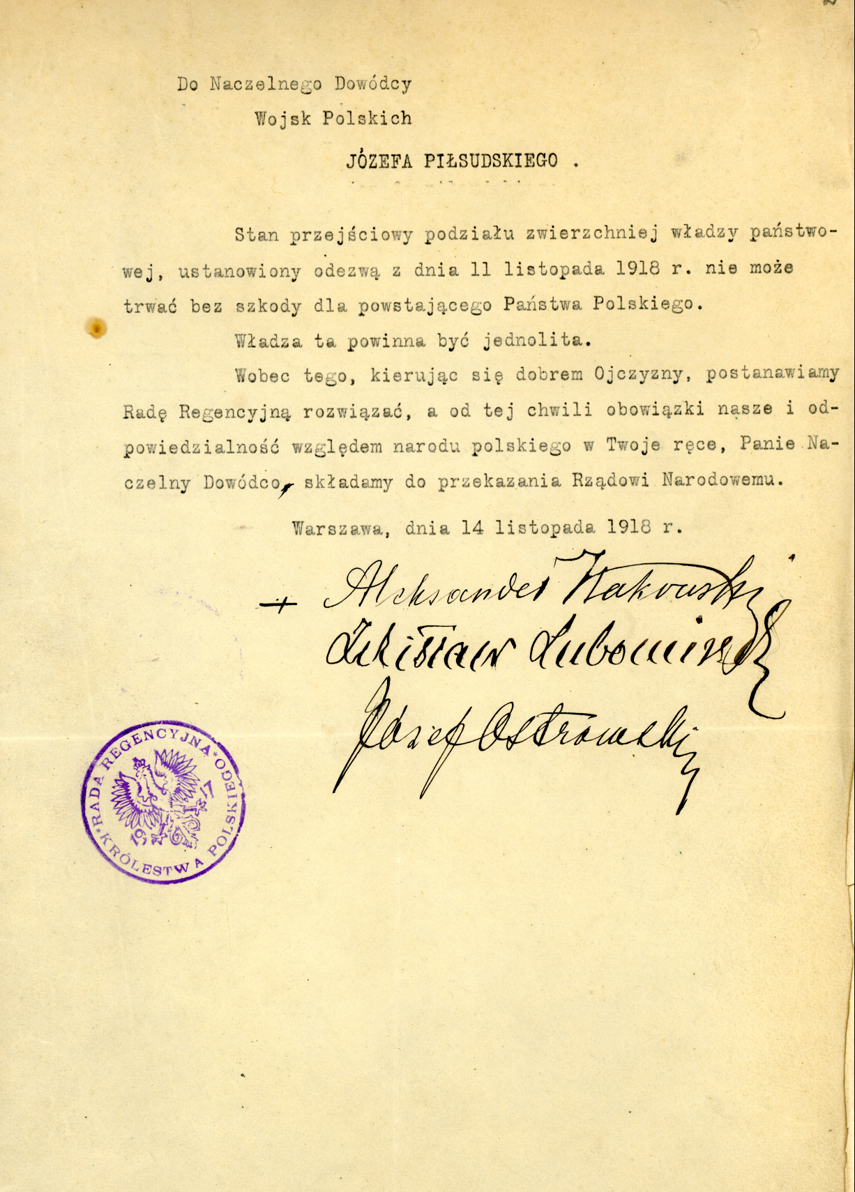 Akt przekazania władzy przez Radę Regencyjną Józefowi Piłsudskiemu